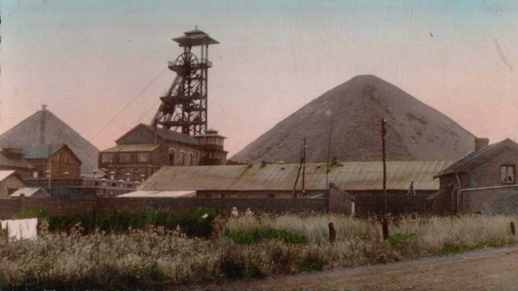 La Fosse Audiffret Pasquier de la Compagnie des mines d'Anzin était un charbonnage constitué de deux puits situé à Escaudain, Nord, Nord-Pas-de-Calais, France.